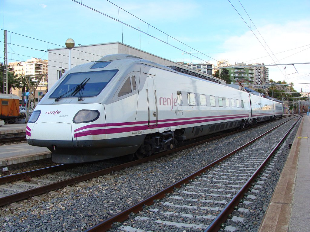 El automotor eléctrico 490.002 de Renfe Operadora, prestando un servicio Alaris, en la estación de Tarragona (Cataluña).